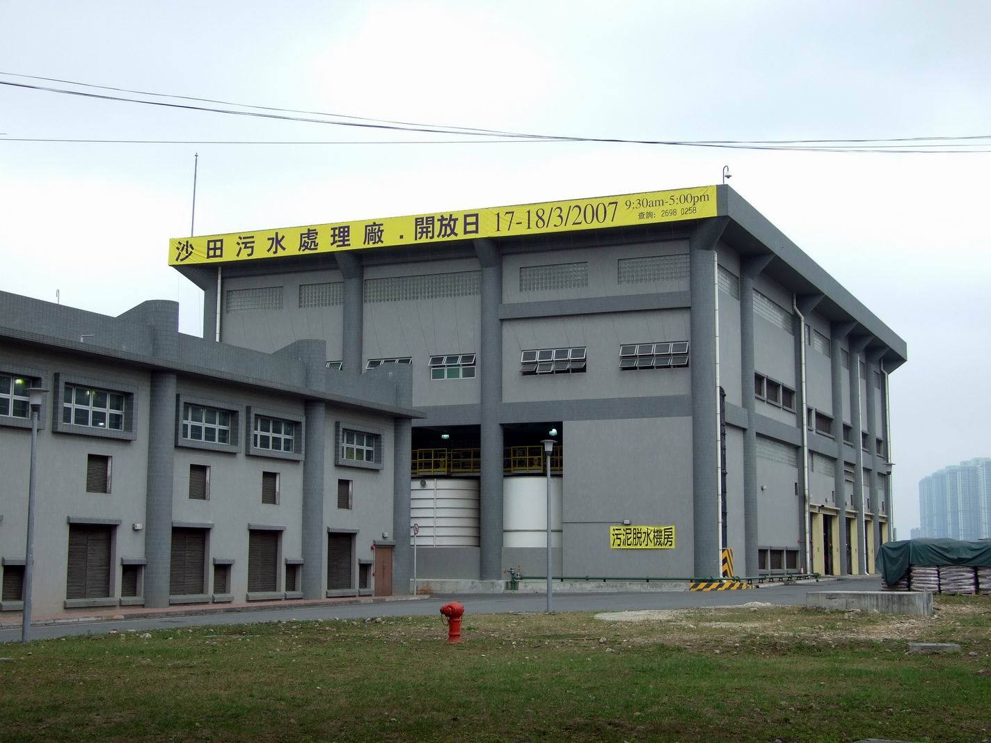 污泥脫水機房